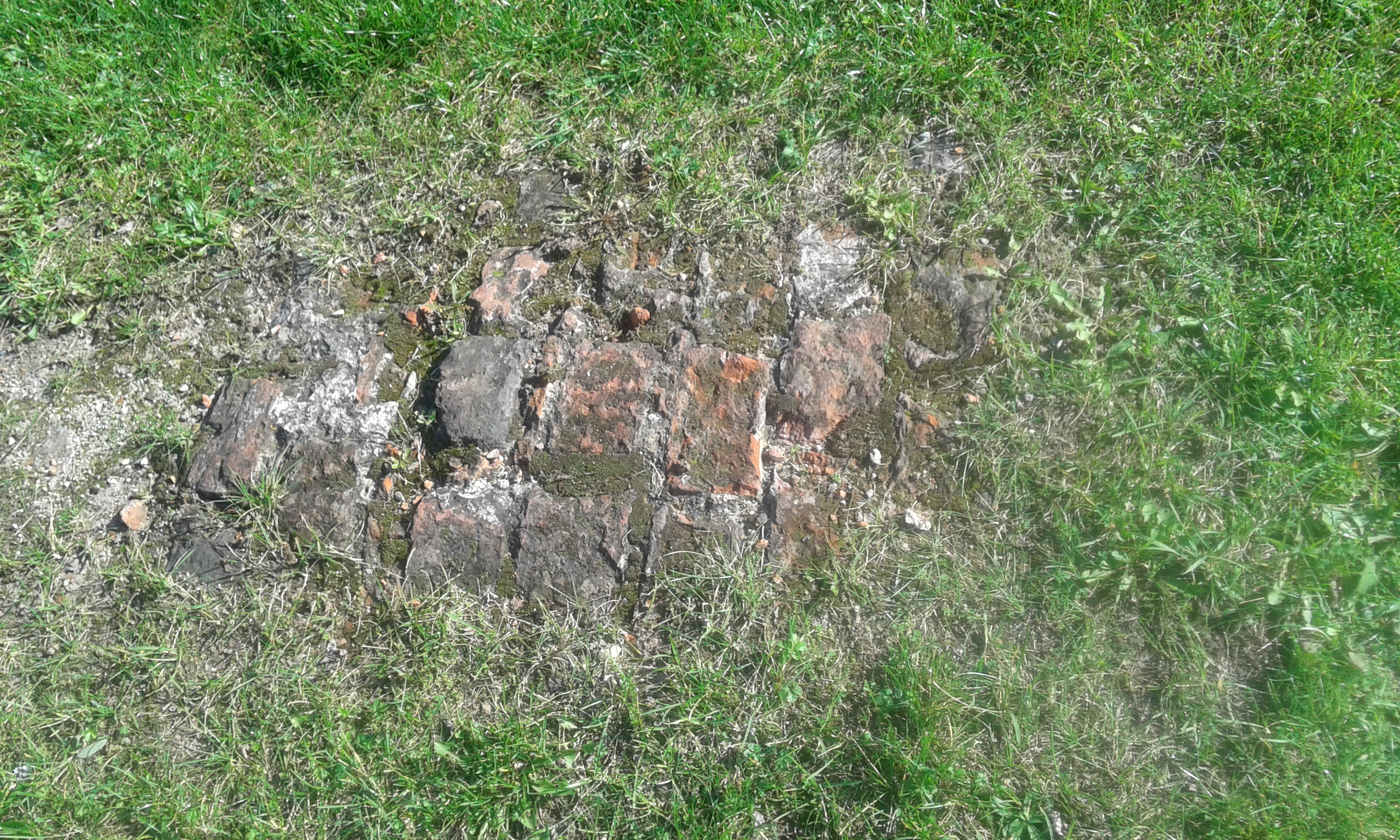 Lubin